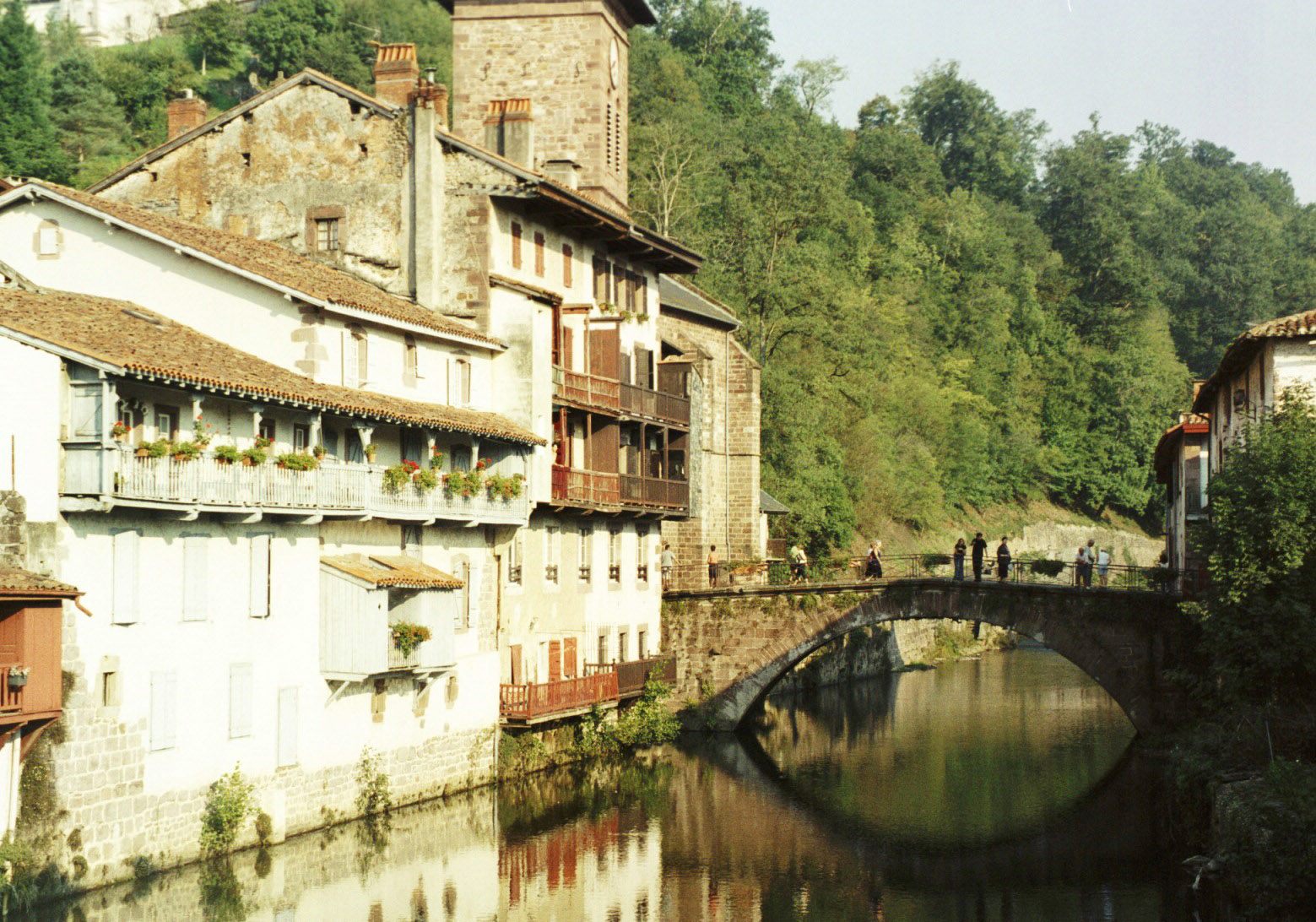 Bridge over river Nive in Saint-Jean-Pied-de-Port, Pyrénées-Atlantiques, France, taken in September 2005 by User:Mtiedemann.